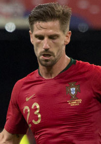 Гол на 93-й минуте и незабитый пенальти Роналду. Иран попортил нервы португальцам